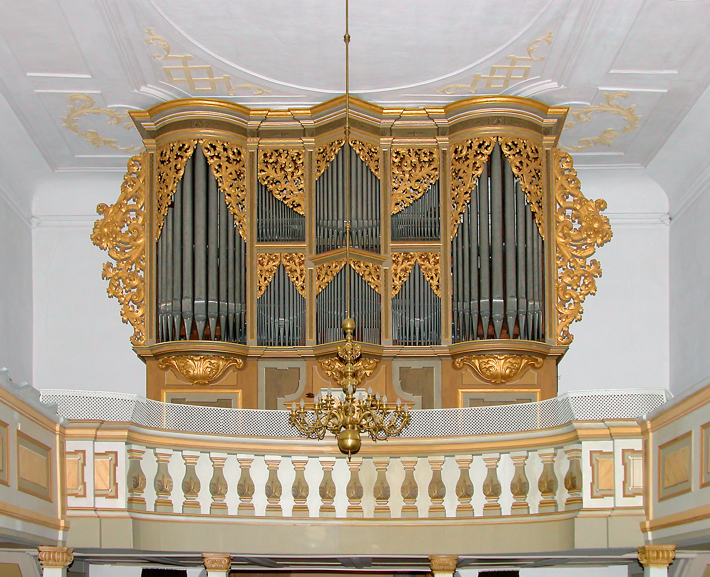 16.10.2006 01990 Großkmehlen): Pfarrkirche St. Georg (1716-1718 auf gotischem Kern). Die in den Jahren 1717/18 von Gottfried Silbermann gebaute Orgel [DSCN12042.TIF]20061016090DR.JPG(c)Blobelt